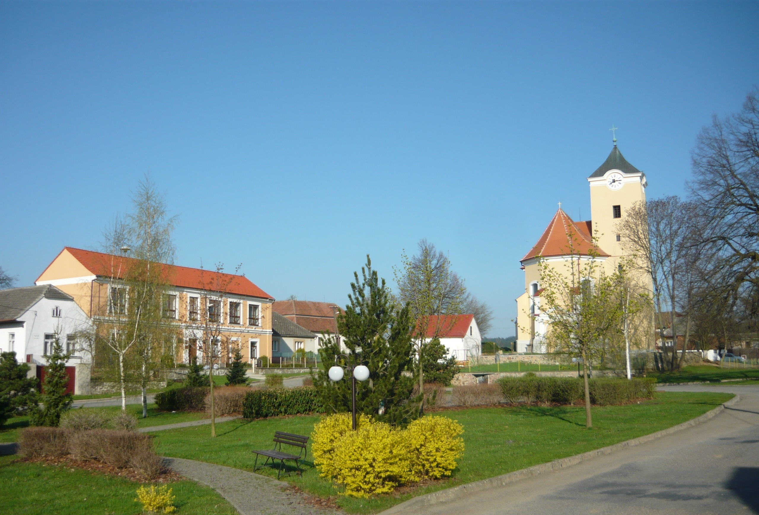 Náves v Martínkově